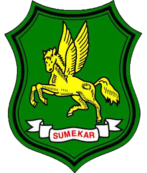 Sumenep